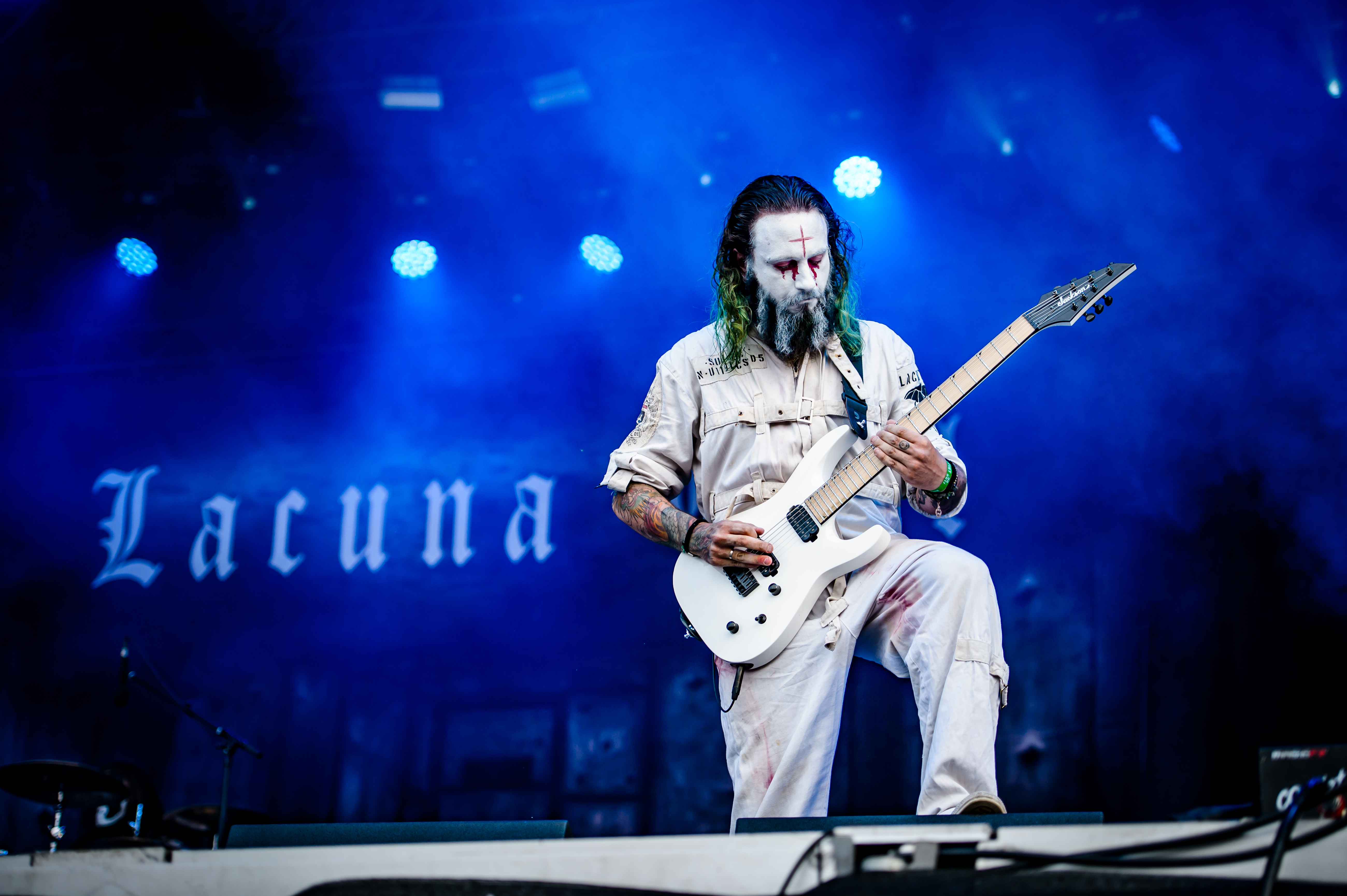 'RockHarz Open Air 2017; Ballenstedt': 'Lacuna Coil'